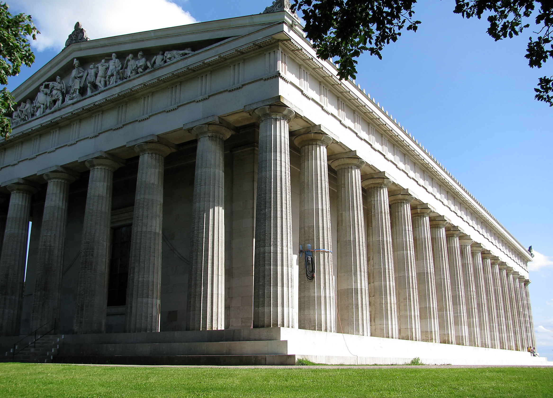 Außenansicht der Walhalla